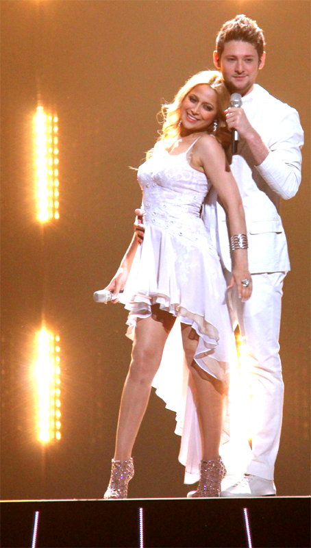 Gewinner des ESC 2011 Aserbaidschan